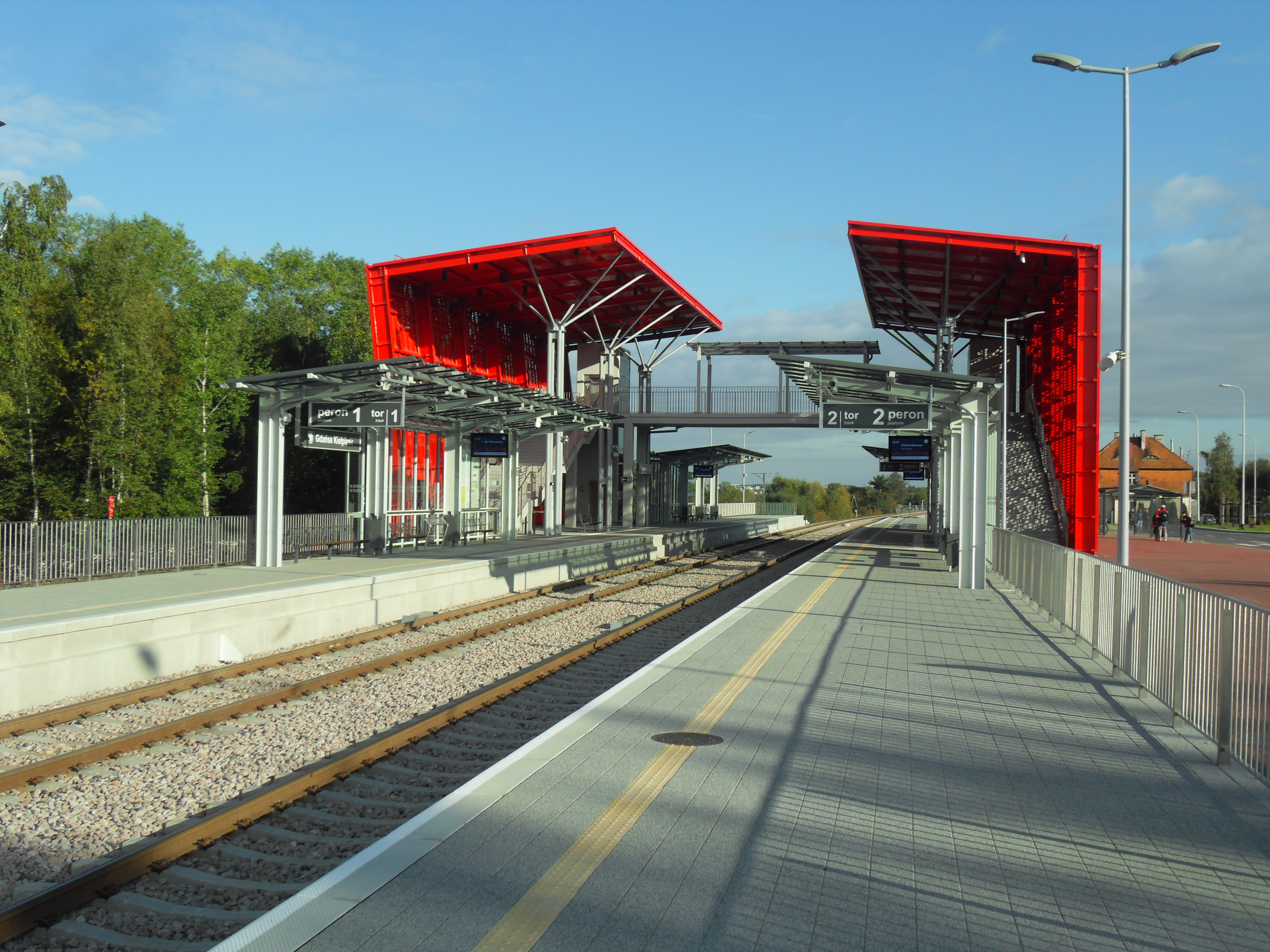 Przystanek Pomorskiej Kolei Metropolitalnej (PKM) Gdańsk Kiełpinek.